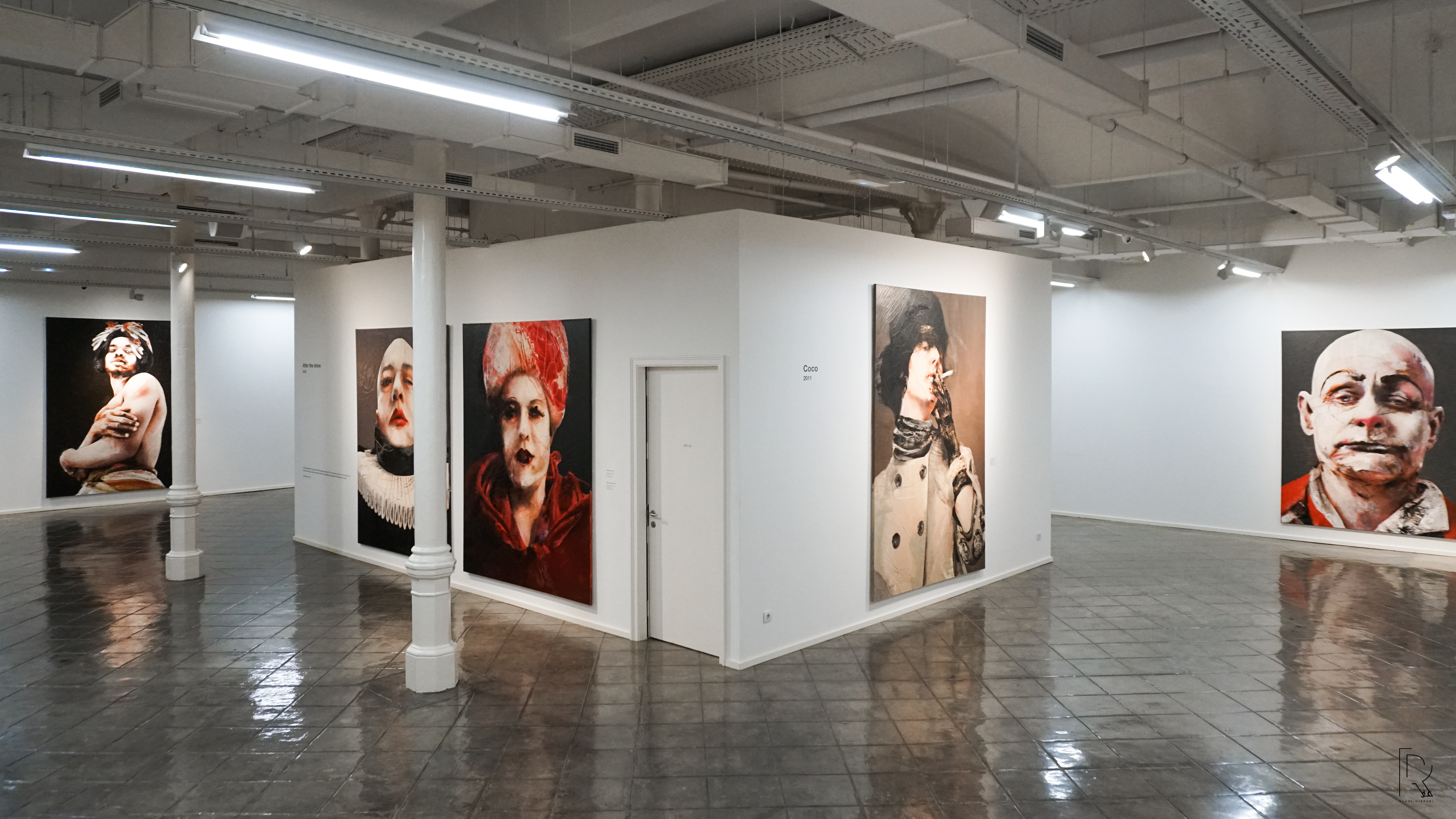 Exposición Lita Cabellut